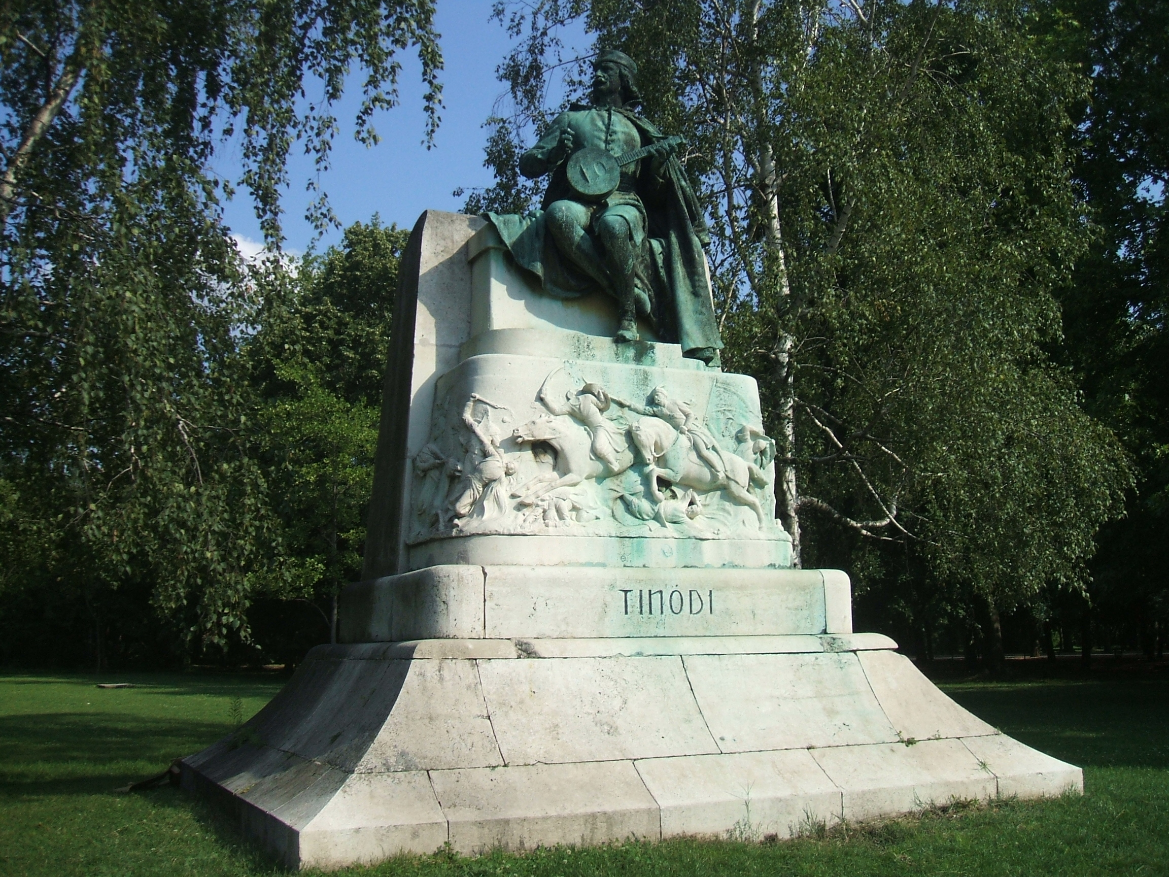 Tinódi Lantos Sebestyén szobra a Népligetben, Budapesten. Bezerédi Gyula (1885–1925) alkotása (1907)